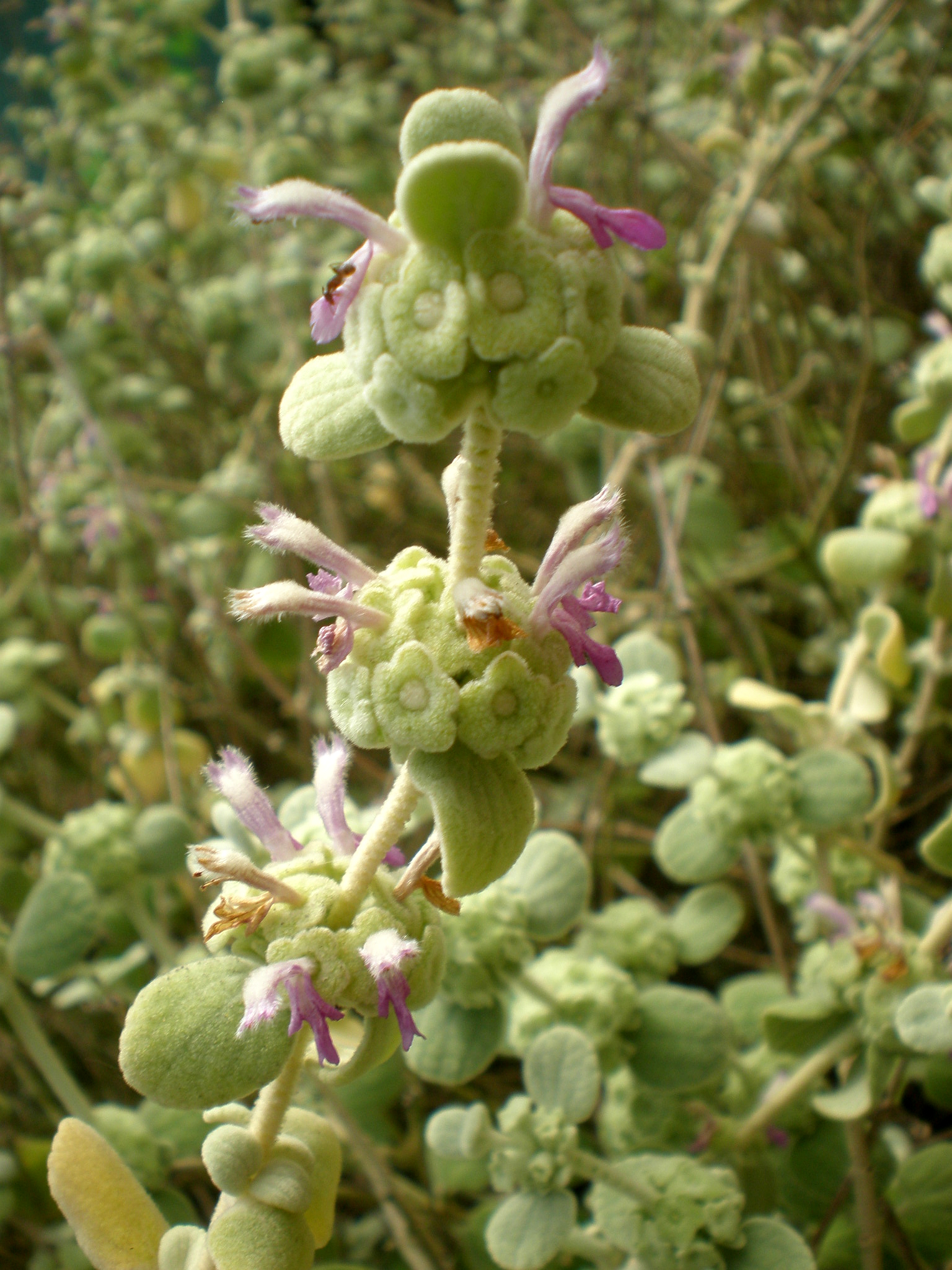 Jardín Botánico de Barcelona.